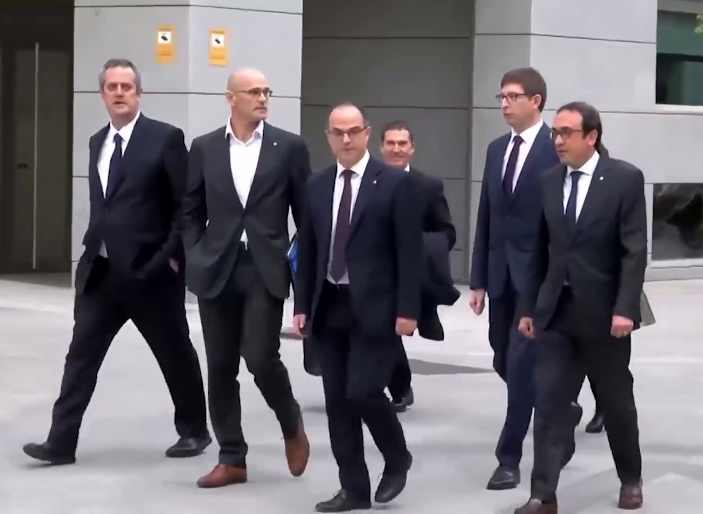 La jueza de la Audiencia Nacional Carmen Lamela ha acordado enviar a prisión sin fianza a Oriol Junqueras y a otros siete consellers que han comparecido este jueves, acusados de rebelión, sedición y malversación de fondos públicos.